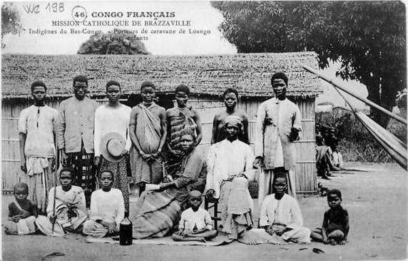 Congo Français - Mission catholique de Brazzaville - Indigènes du Bas-Congo Porteurs de caravanes de Loango et leurs enfants